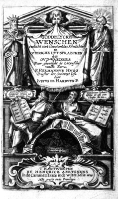 Buchcover "Goddelycke wenschen" von Justus de Harduwijn 1629